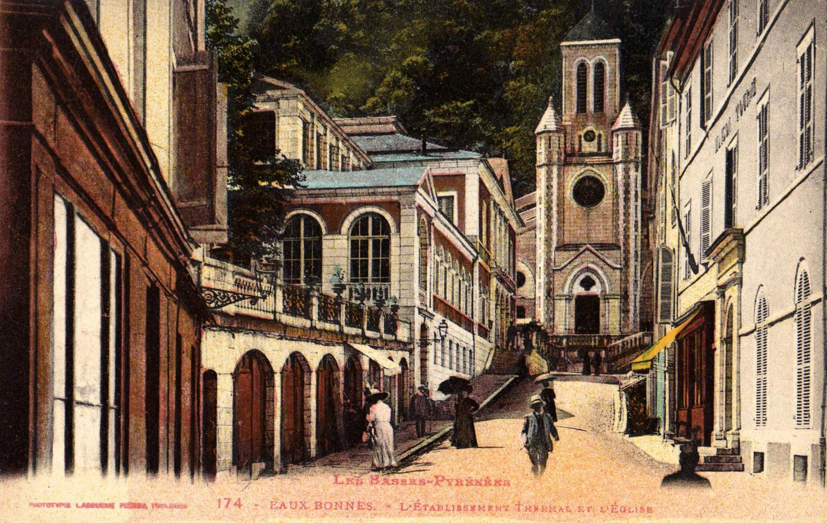 Vue de l'église et de l'établissement thermal, Eaux-Bonnes,Pyrénées Atlantiques, France.